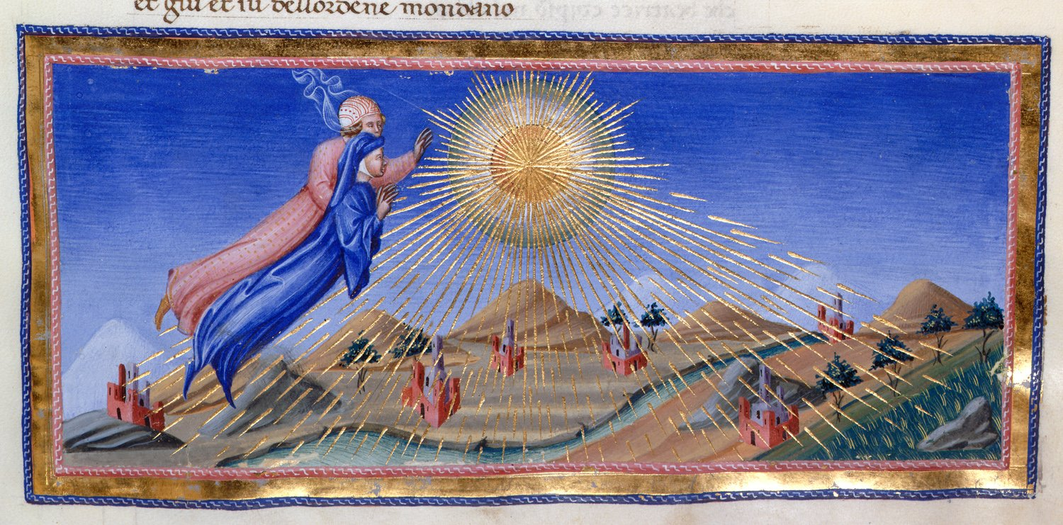 Giovanni di paolo, paradiso 18 cielo del sole.jpg